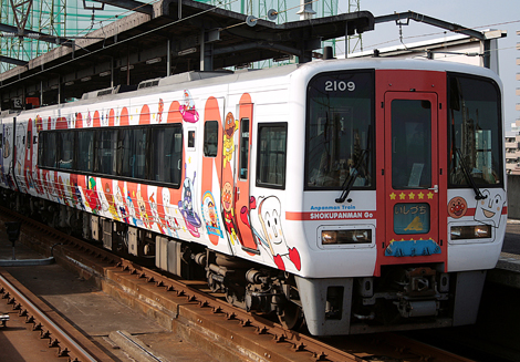 撮影:trainfan2011